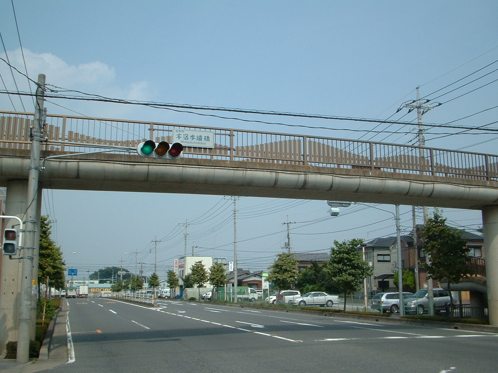 北本市にある本宿歩道橋交差点